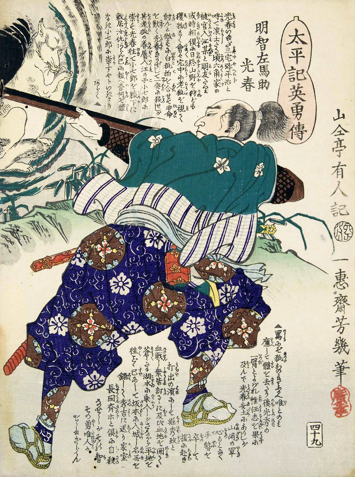 太平記英勇伝四十九：明智左馬助光春（明智秀満）